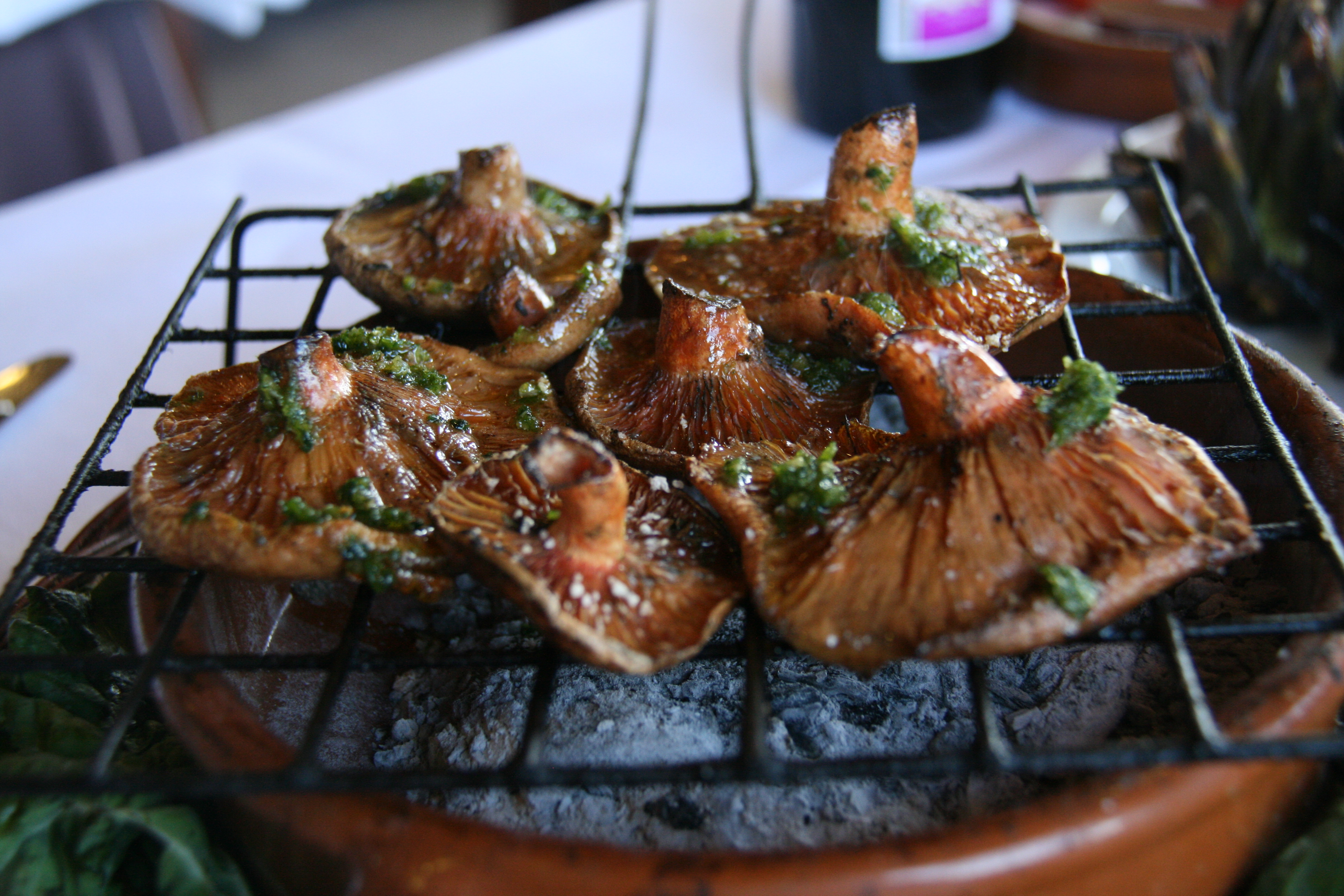 Rovellons asados